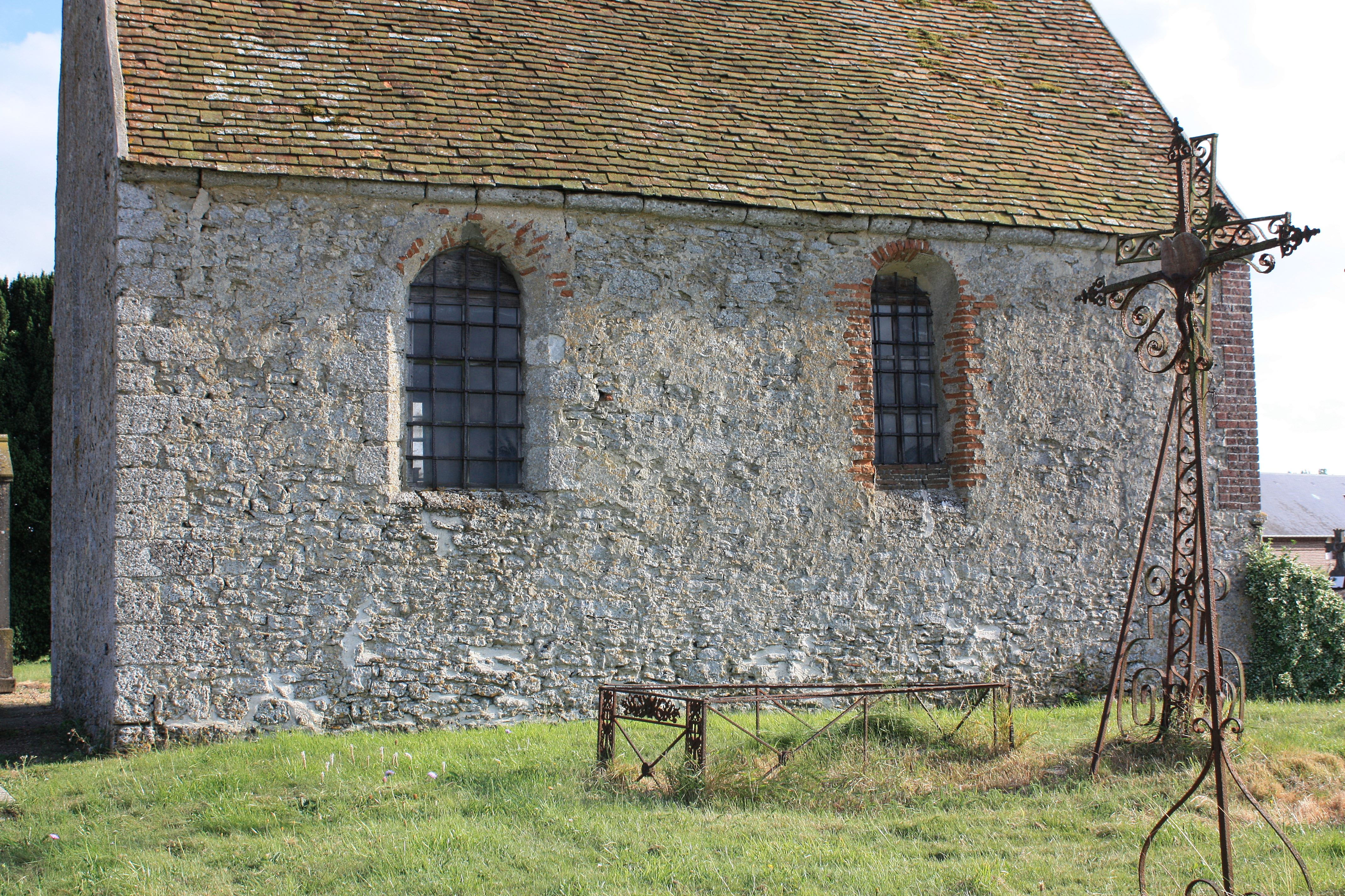 Saint-Étienne-des-Prés, église